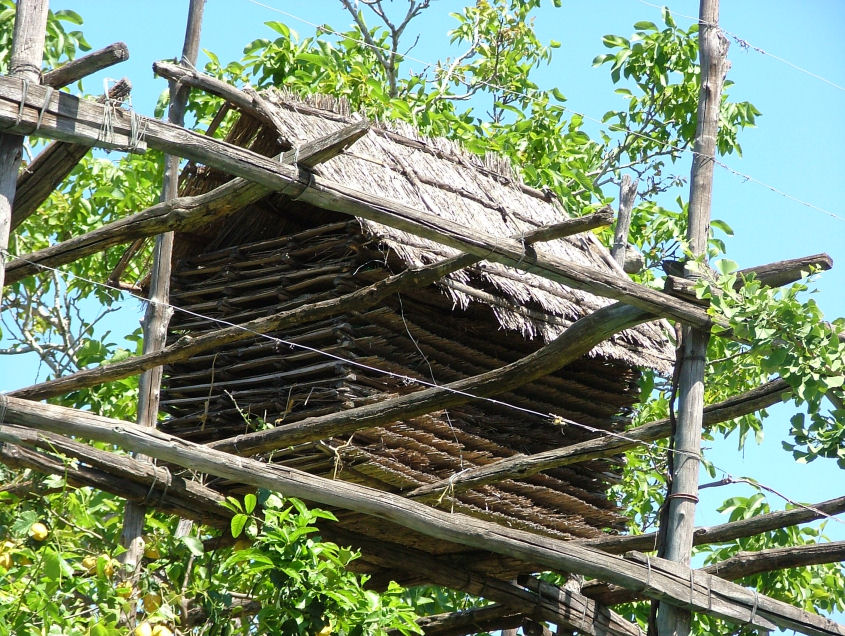 Limoneto di Sorrento : tipiche pagliarelle – accataste sul pergolato - che formano una struttura a forma di capanna dette « cogne » - Italia.